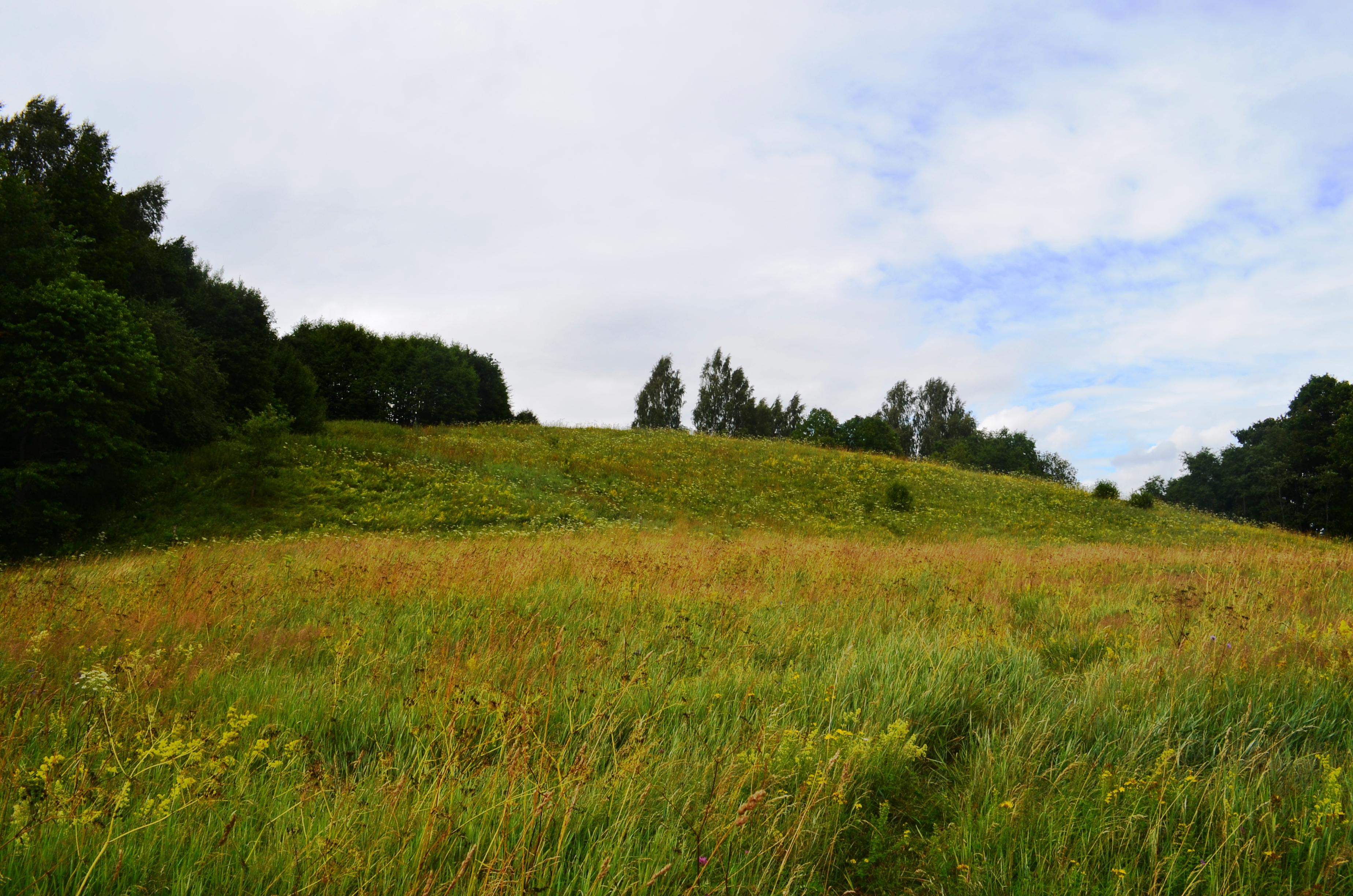 Burbiškių piliakalnis (Paršpilis), Šilalės raj. Žemaitėška: Borbėškiu pėliekalnis (Paršpėlis), Šėlalės raj.